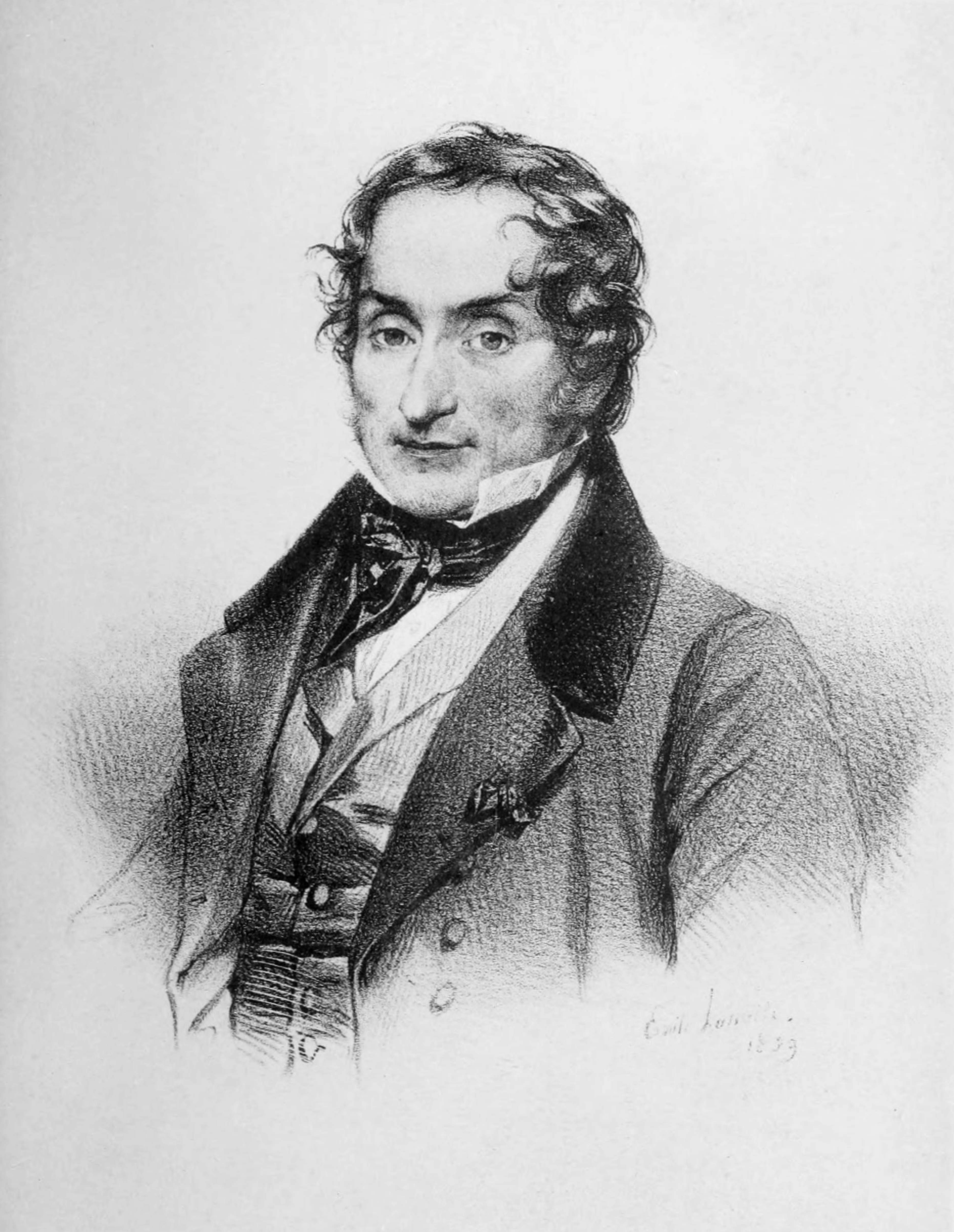 lithographie: portrait de Charles Nodier